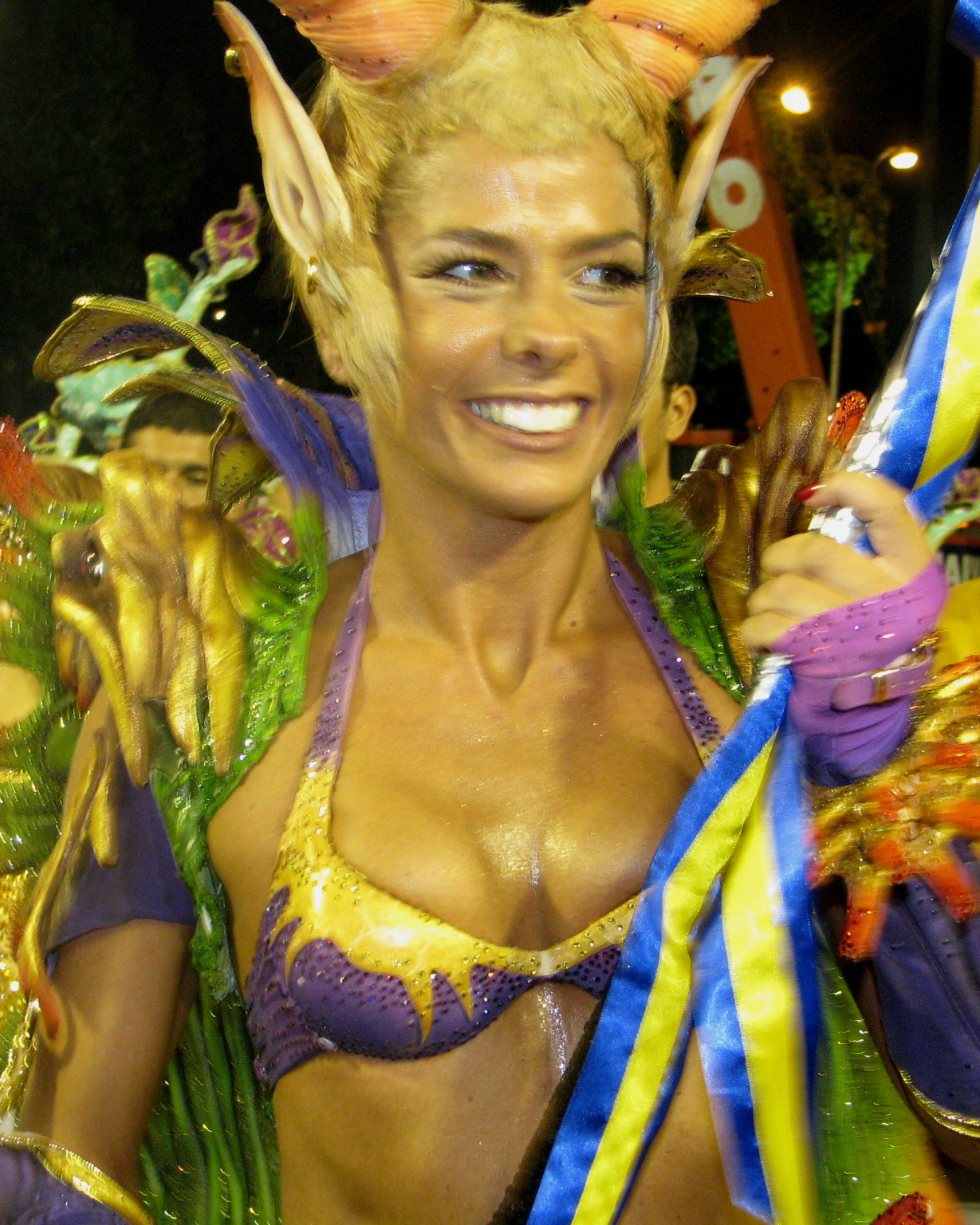 A atriz, modelo e apresentadora de TV brasileira Adriane Galisteu, no Carnaval carioca de 2008